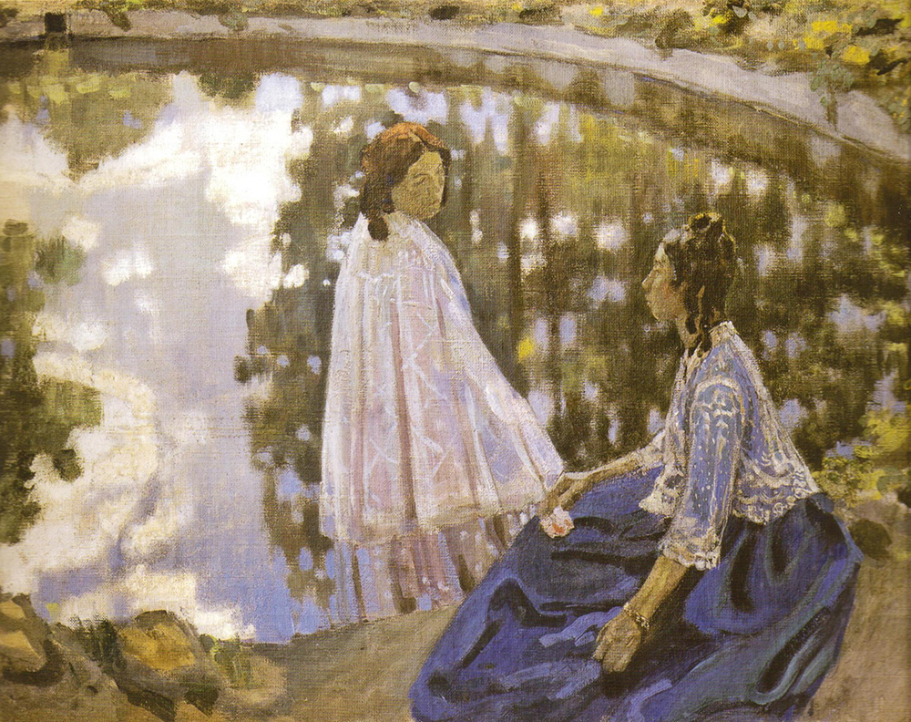 Виктор Борисов-Мусатов. «У водоема». 1902. Фото: Государственный Русский музей